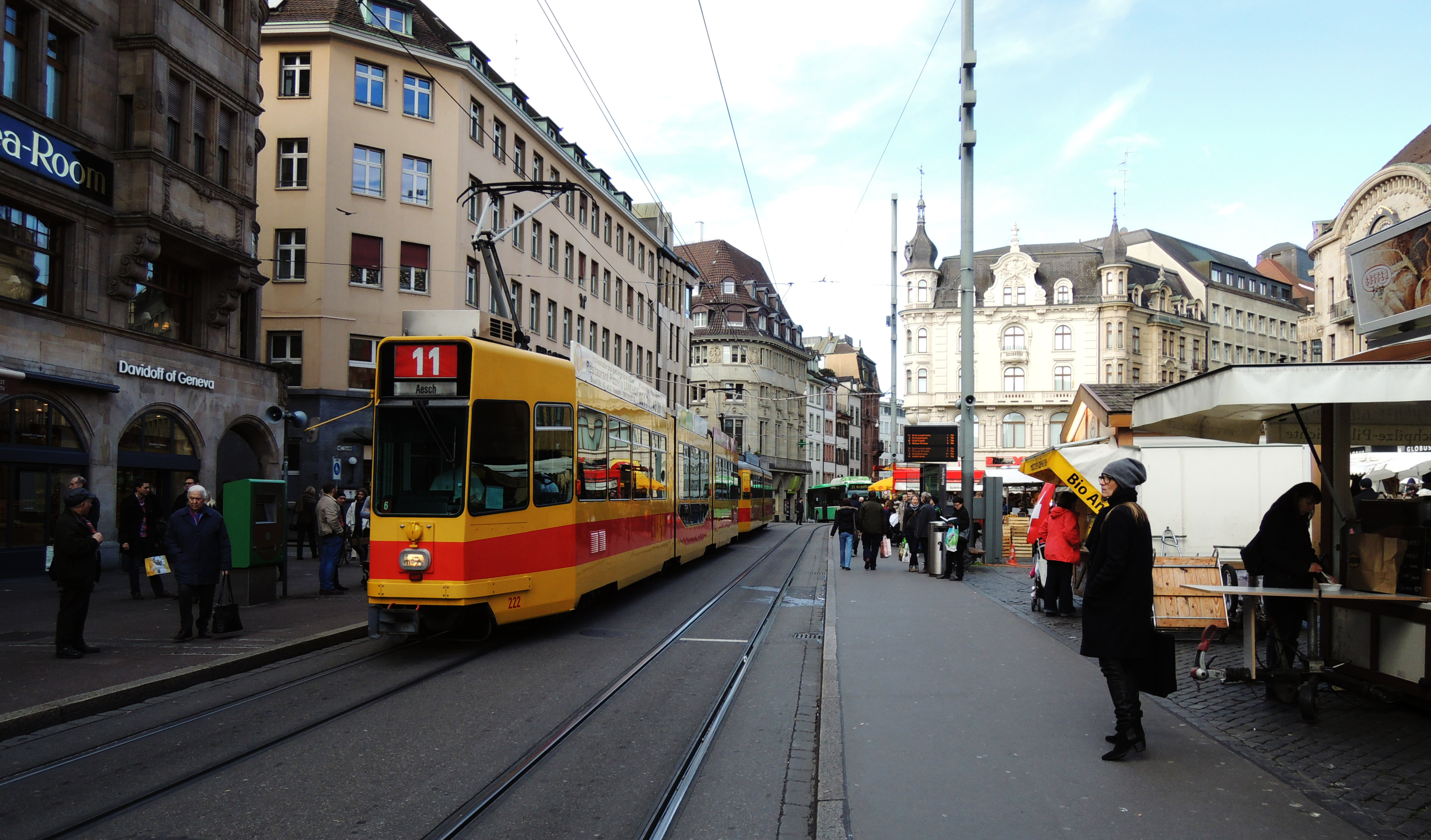 Tramwaj Baselland Transport AG. Model Be 4/8.